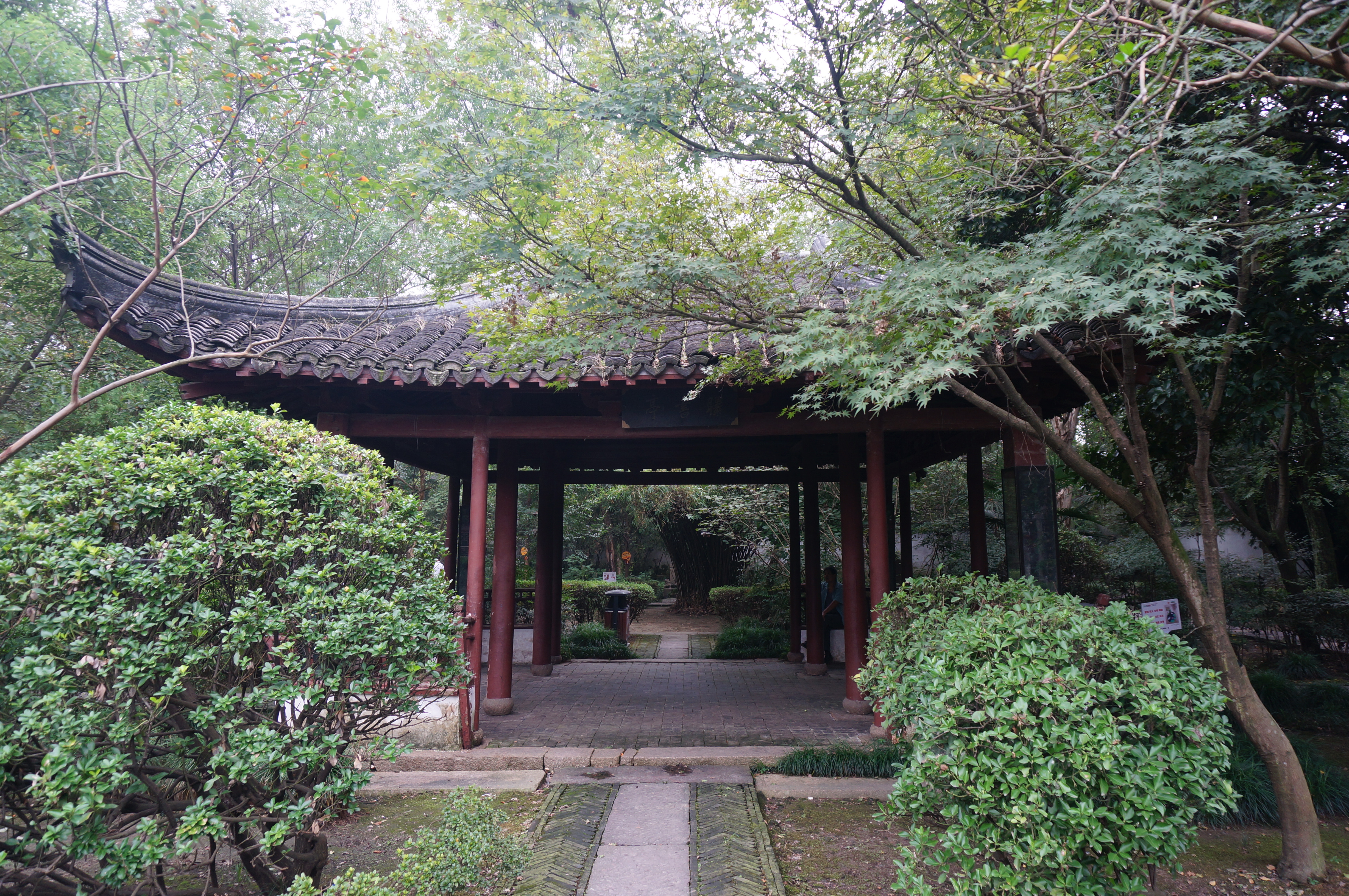 王店镇曝书亭（朱彝尊故居），曝书亭北面。